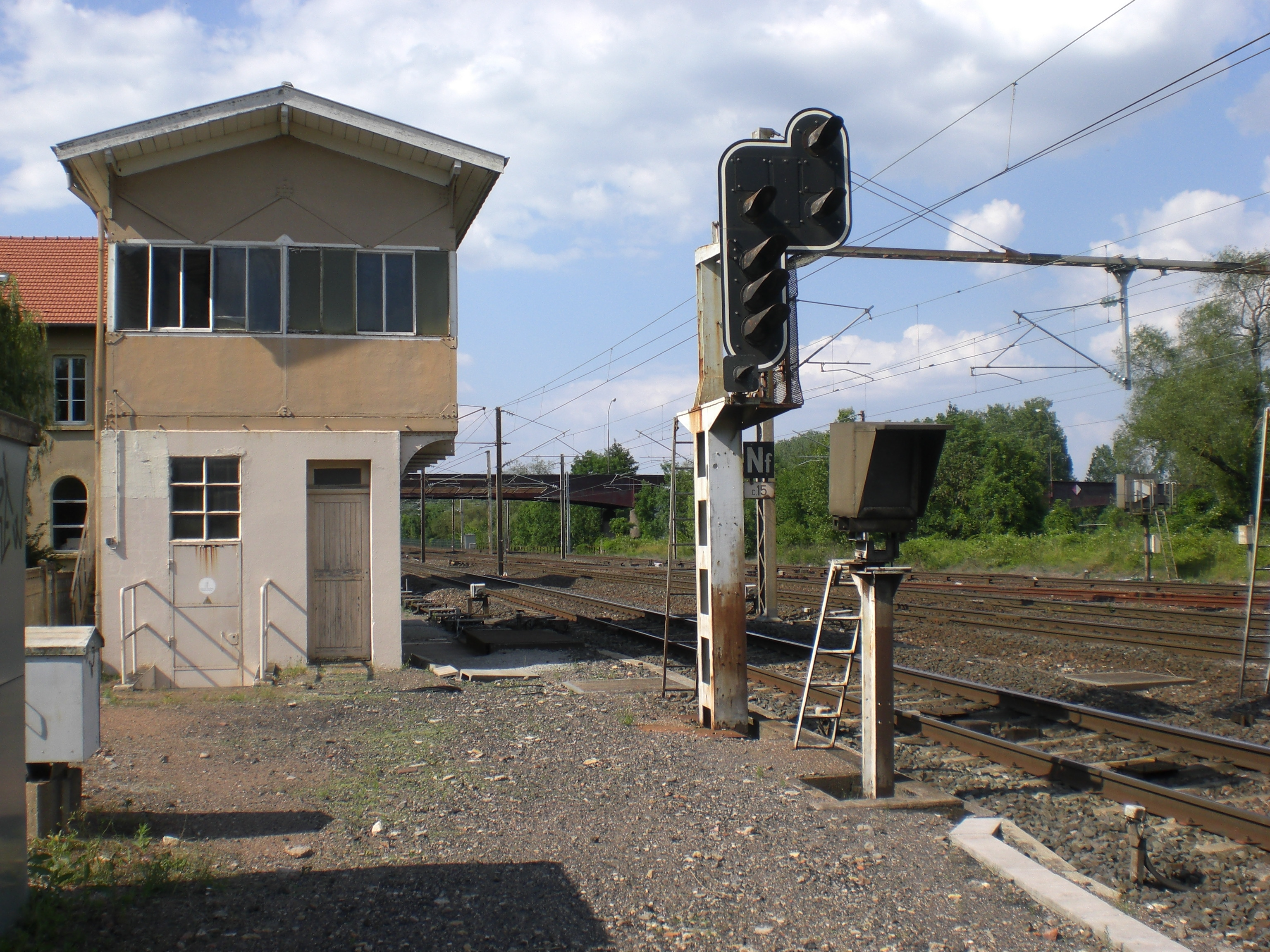 Stellwerk am Bahnhof Novéant-sur-Moselle